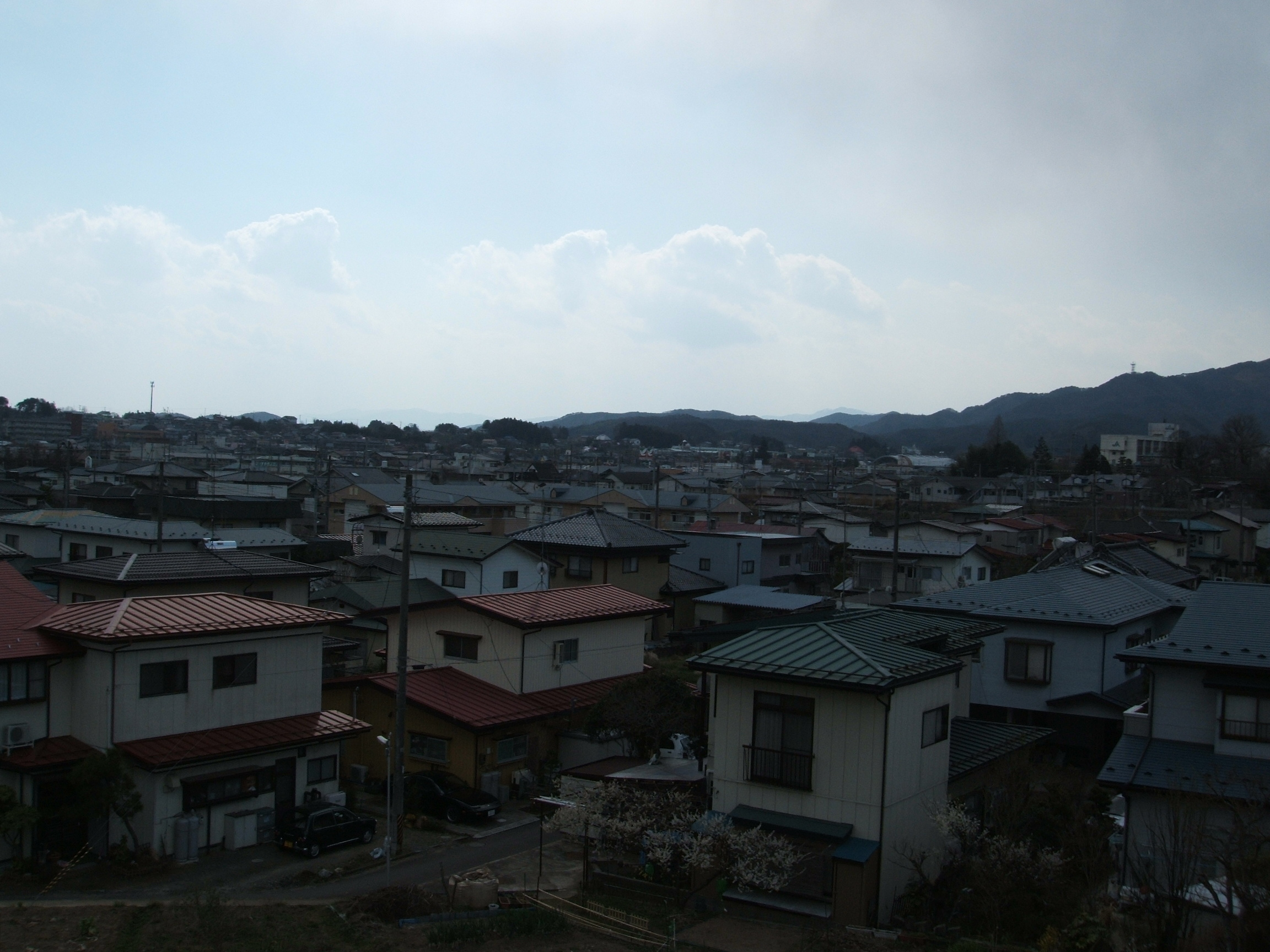 Motomiya city